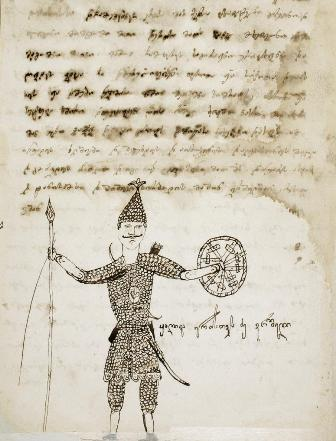 ქსნის ერისთავიანთ ისტორია (H-2496)